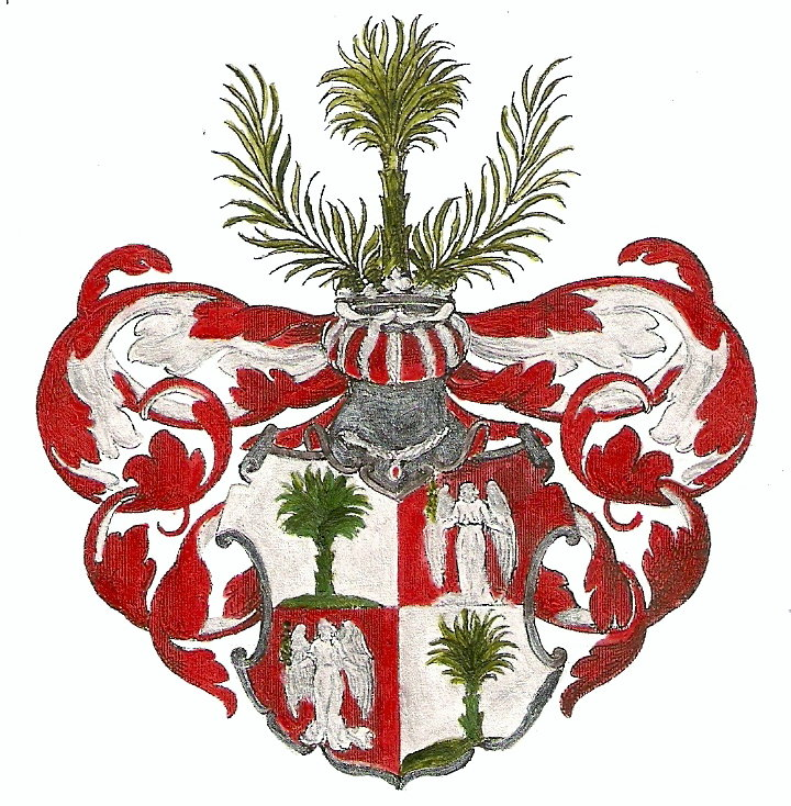 Wappen